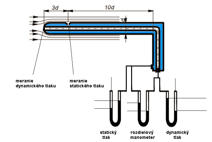 Obrazek opisujący zasadę pomiaru ciśnienia płynów przy pomocy rurki Prandtla.